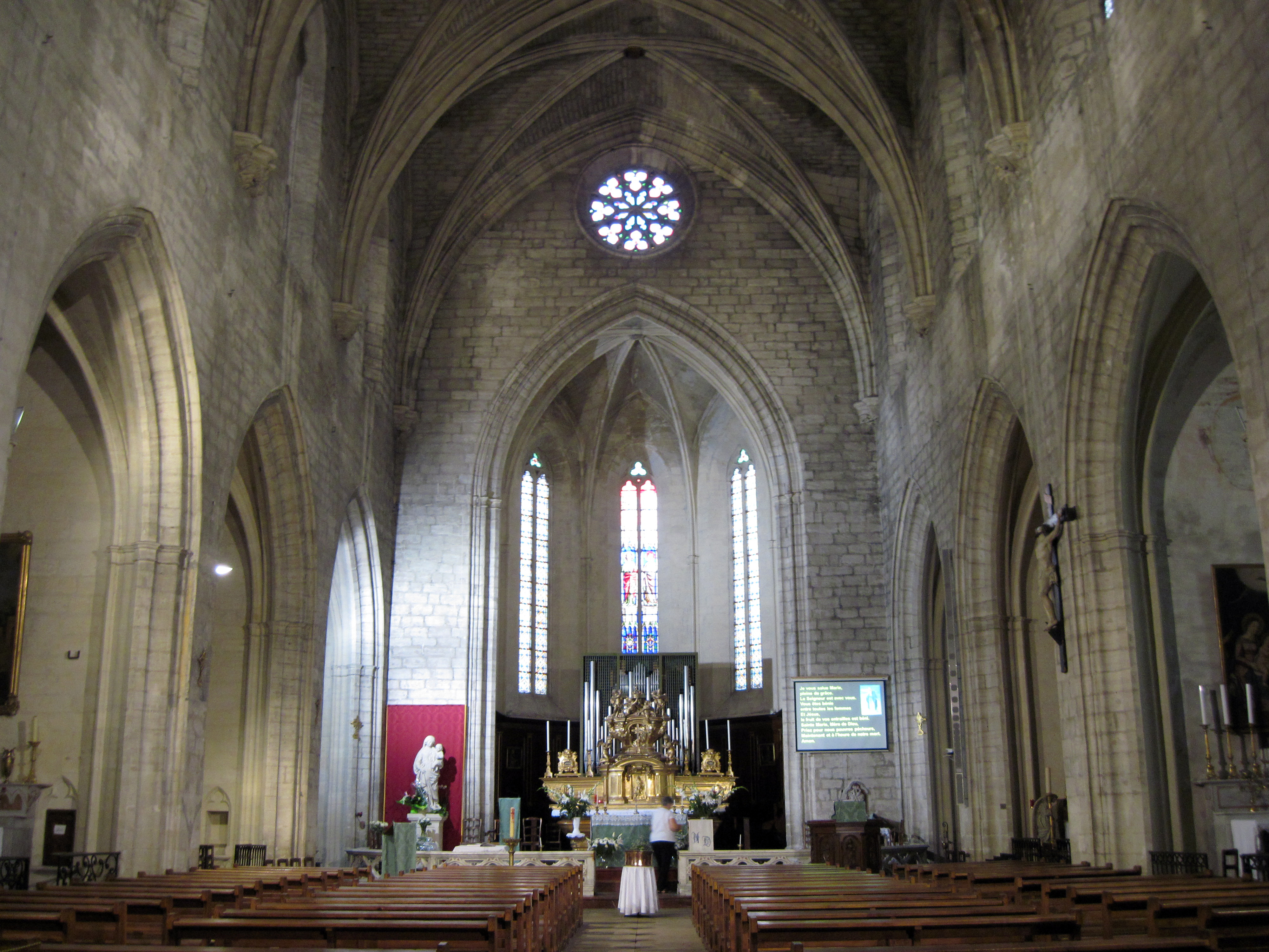 Intérieur de l’église Notre Dame de Bon Repos à Montfavet (2015)